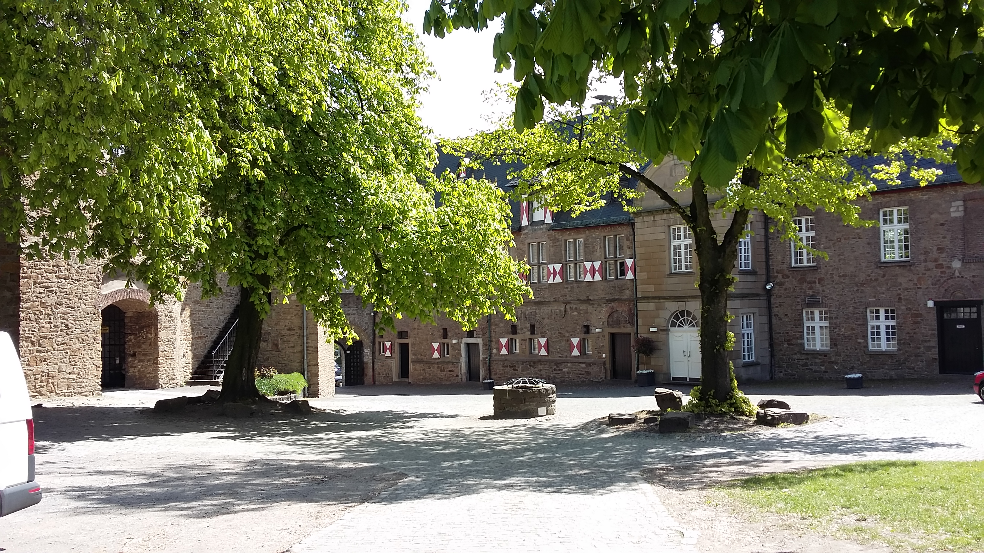 Schloss Broich